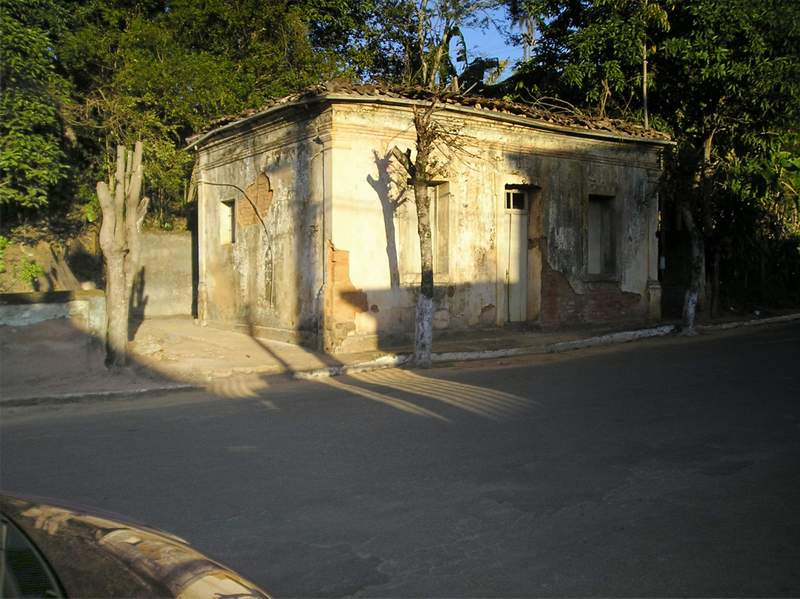 Antigo prédio do presídio em Guarará-MG - Prédio histórico, construído em 1889